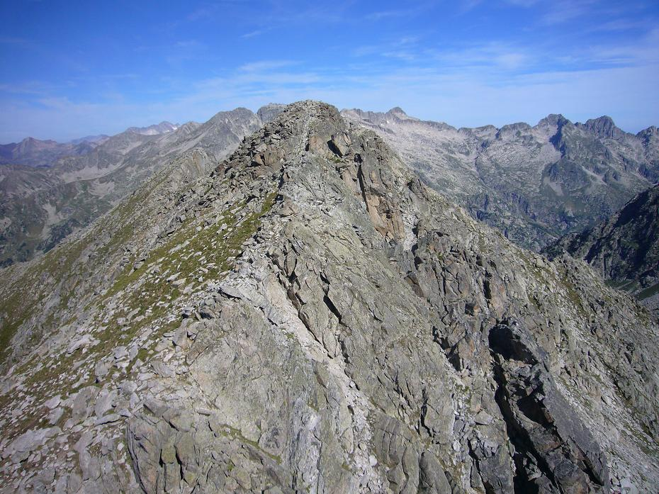 Pic de Comaltes, vista des del més oriental dels Pics de Comaltes; la Vall de Boí, Alta Ribagorça, Catalunya